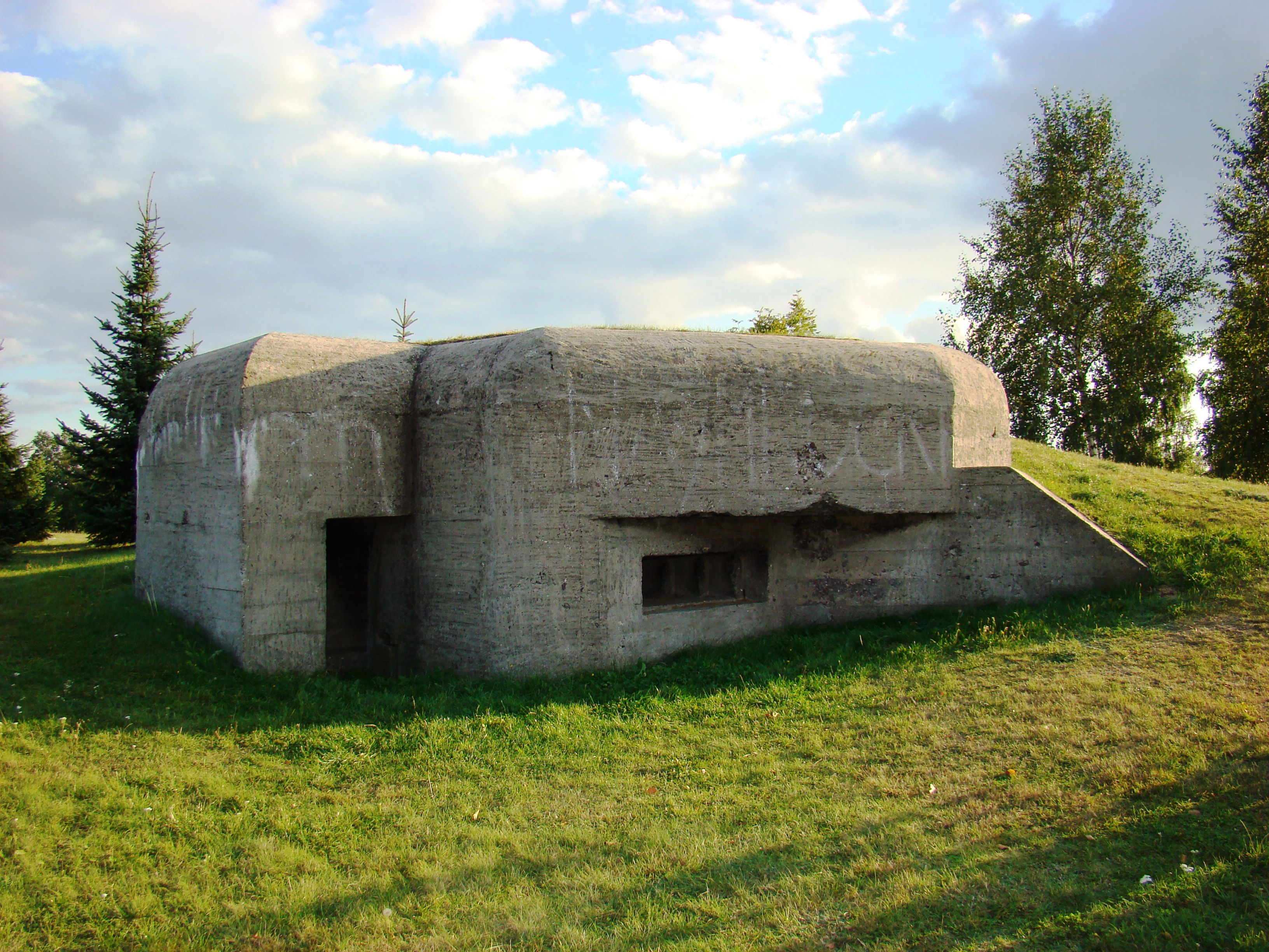 Polski schron bojowy 09 wybudowany w lipcu 1939 roku w ramach częstochowskiej reduty (składającej się z 19 bunkrów, znanych jest 12), znajdujący się obecnie na terenie częstochowskiego cmentarza komunalnego. Jest to schron do ognia jednobocznego, prawostronny. Obiekt był obsadzony przez żołnierzy 2 kompanii ckm II batalionu 27 pp. 2 września brał udział w ciężkich walkach o wzgórze 296,6 (Liszka Górna). Schron jest zamknięty, a teren wokół uporządkowany. Można na nim zobaczyć ślady ostrzału pozostałe po walkach. Jest to jeden z najlepiej zachowanych schronów w Częstochowie.